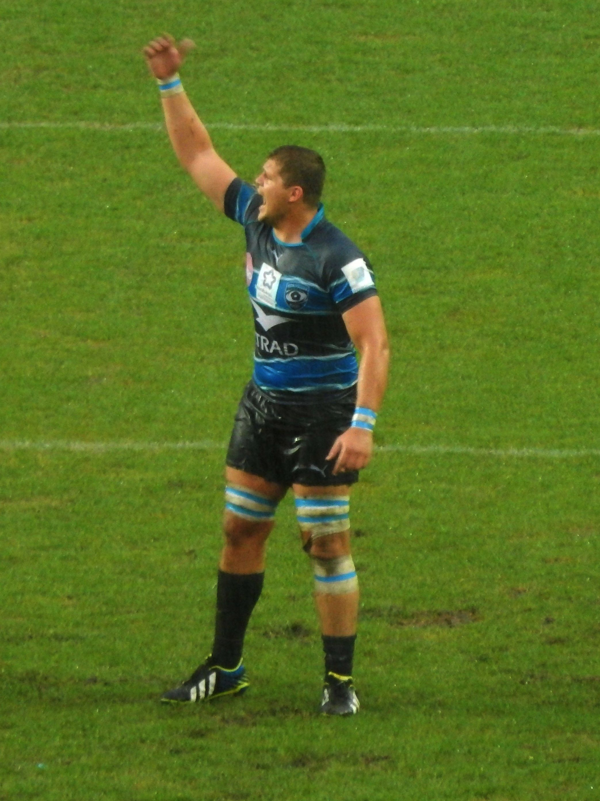 Paul Willemse (MHR), août 2015.